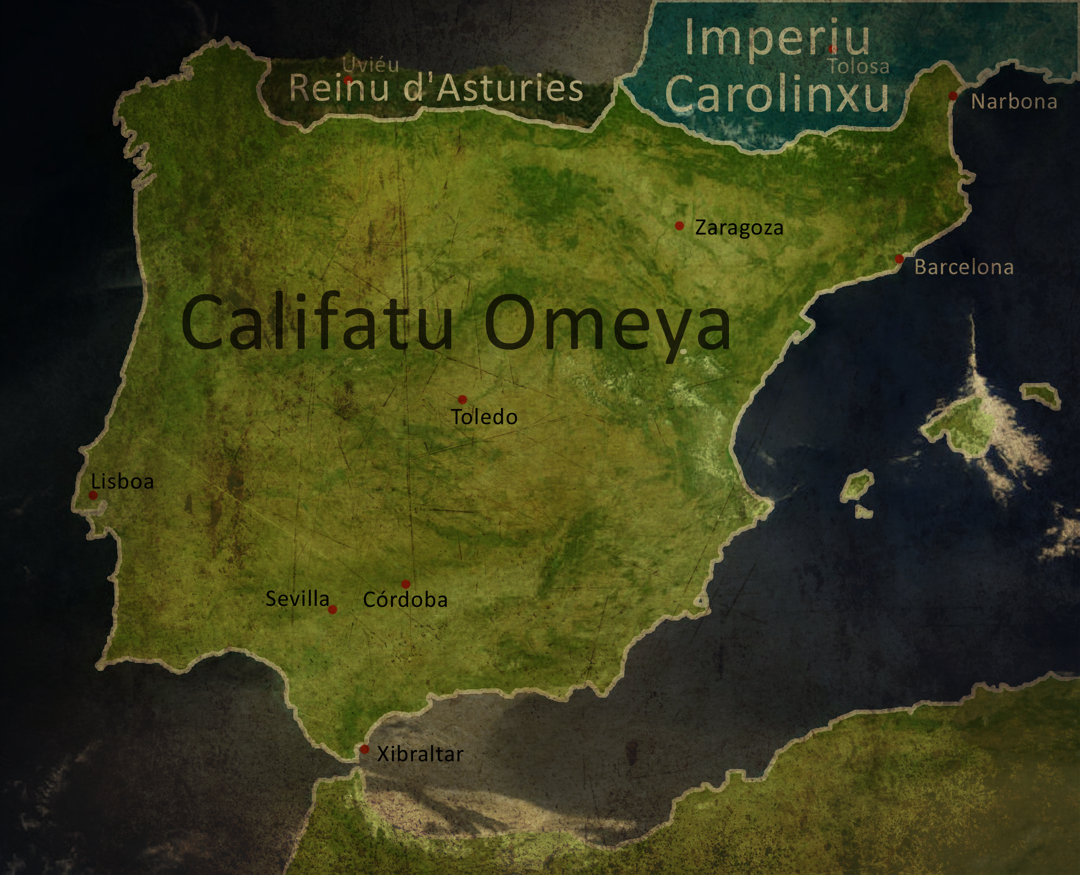 Reinu d'Asturies (750 d.C)